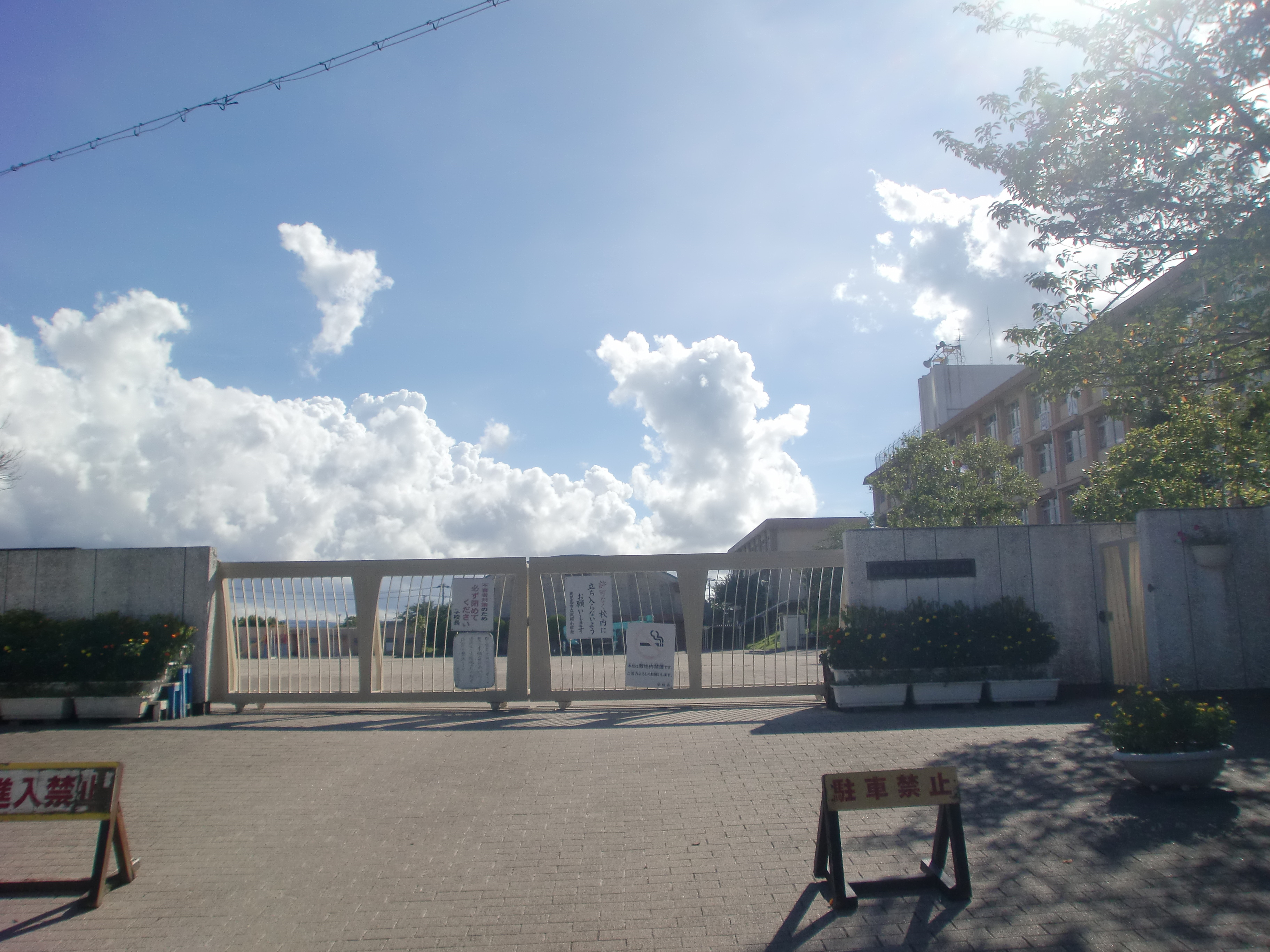 鹿児島市立武岡小学校の外観。